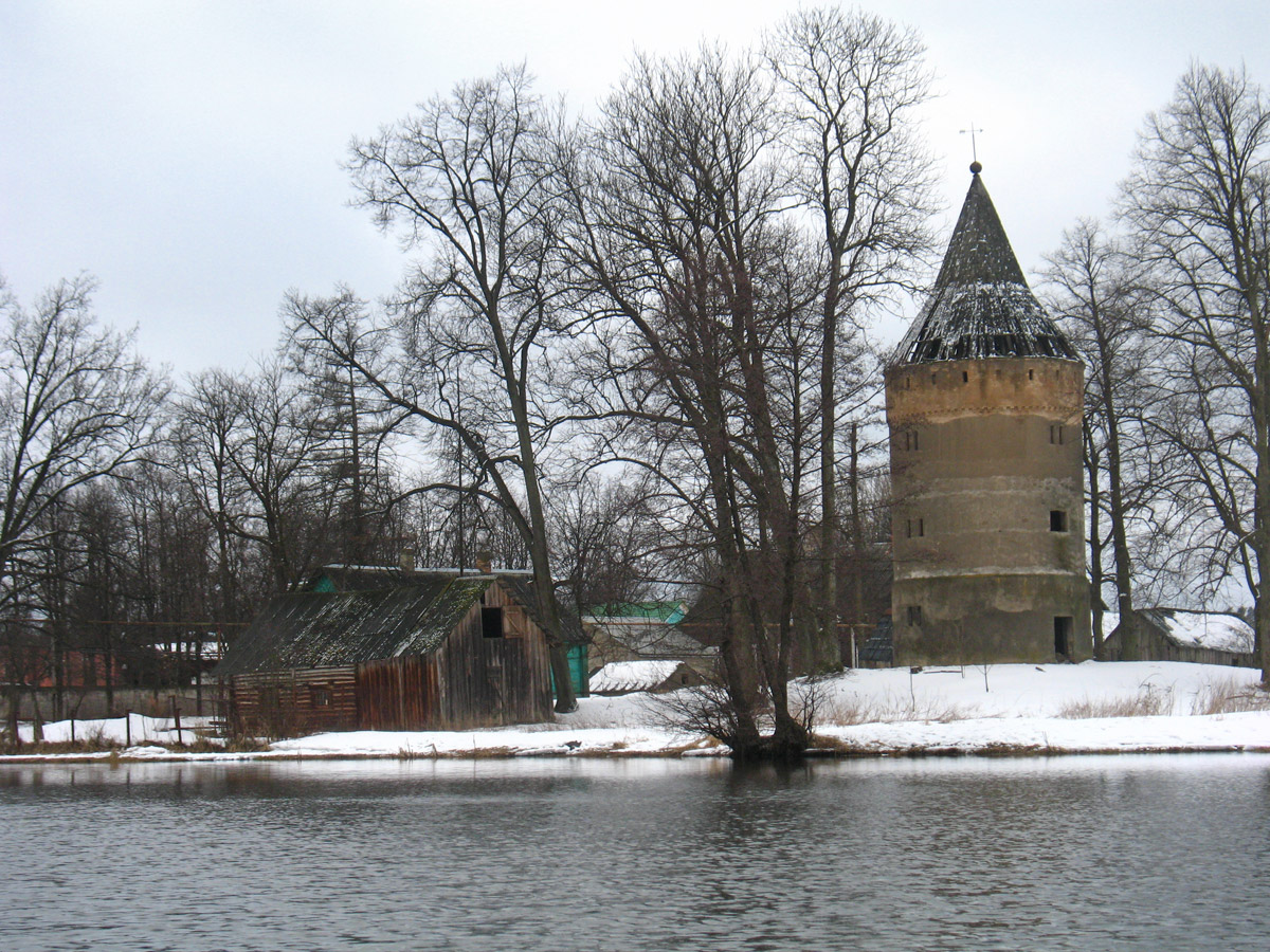 Беларуская (тарашкевіца): Сядзіба ў Лынтупах